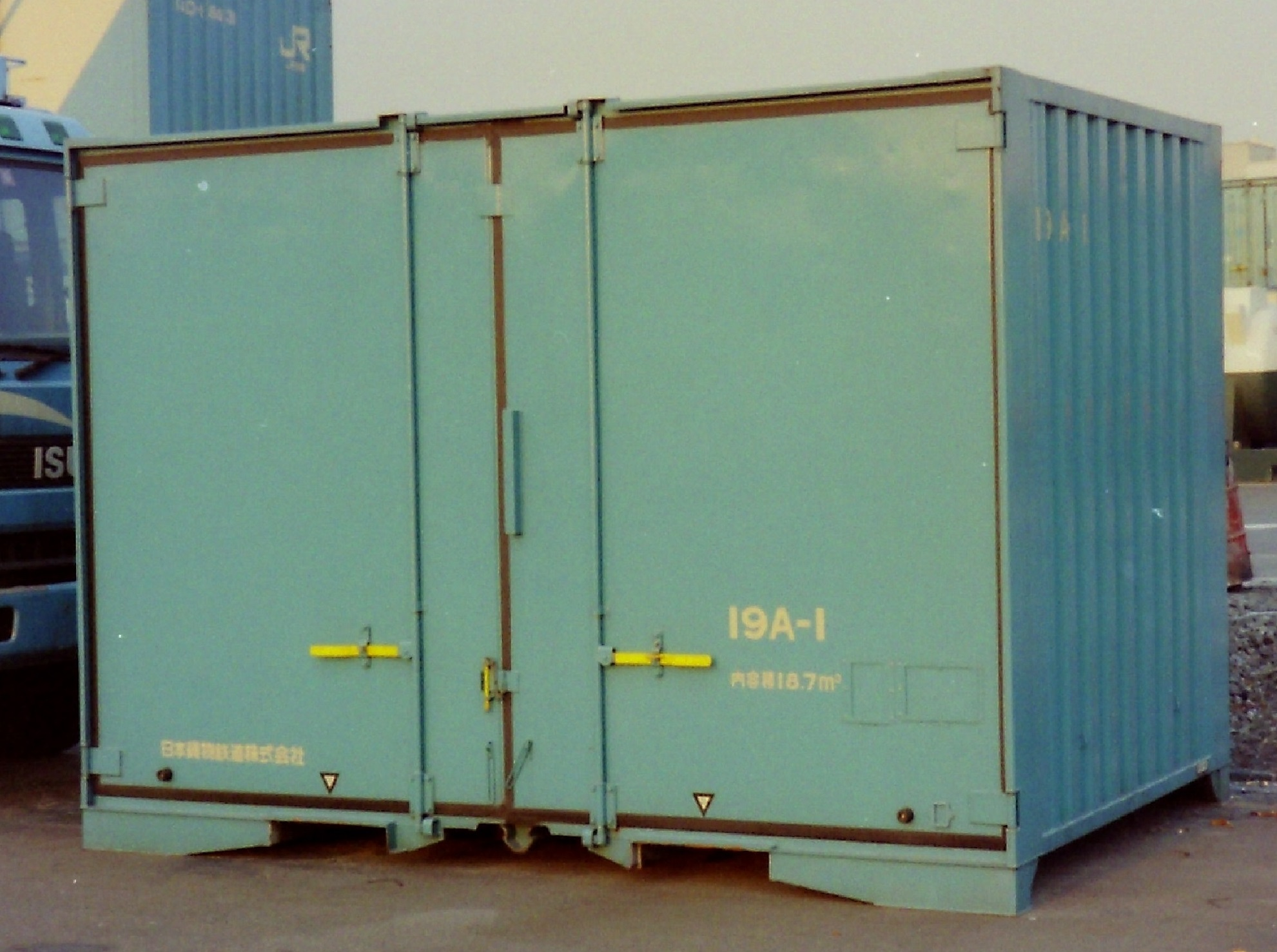 撮影地＝東京(タ)